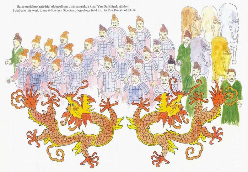 Rajz Csin Si Huang-ti császár agyahadseregének egy részletéről